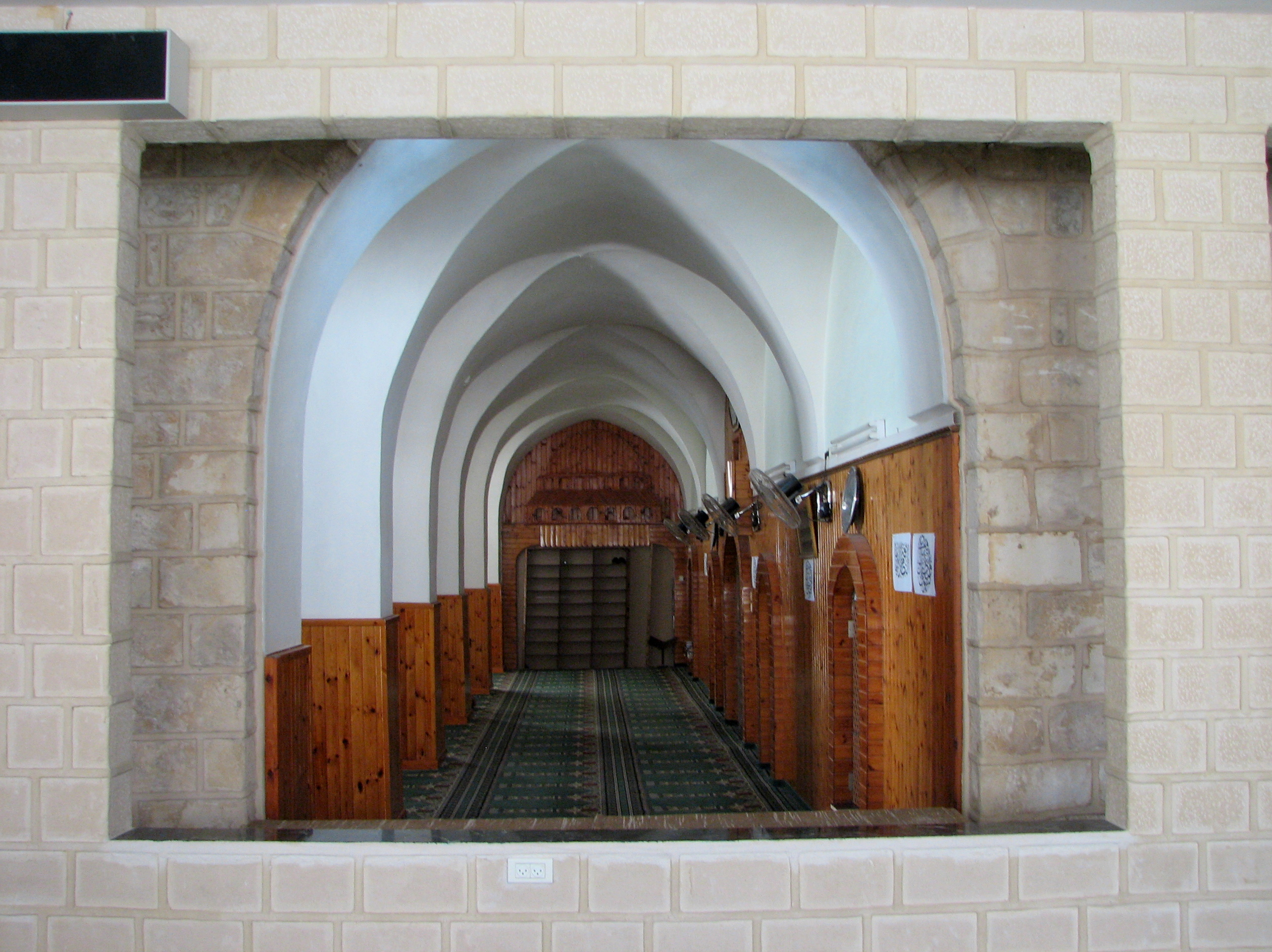 white mosque in Nazareth. The White Mosque is the oldest mosque in Nazareth, Israel and is located in Harat Alghama or the "Mosque Quarter" in the center of Nazareth's Old Market המסגד הלבן הוא מסגד השוכן בלב השוק העירוני בנצרת. המסגד הוא המסגד העתיק בעיר וקודם להקמתו נהגו תושביה המוסלמים של נצרת להתפלל בבית הסראייה שהוקם על ידי דאהר אל-עומר באמצע המאה ה-18.